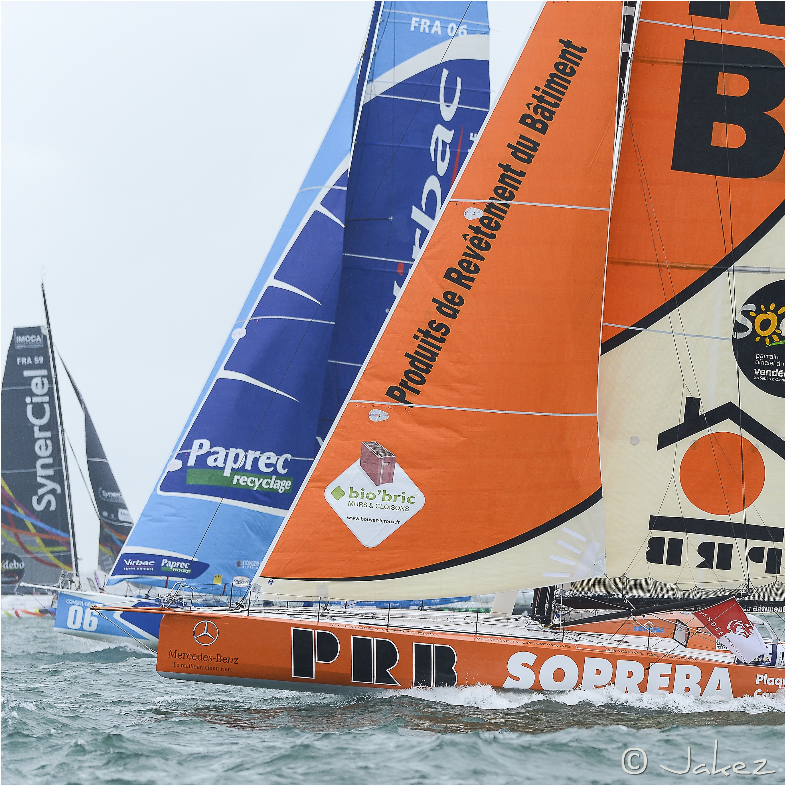 0452-Vendée 2012 (Départ)